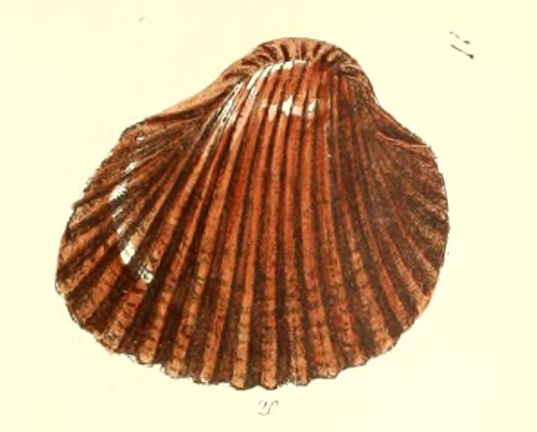 Anadara gibbosa (Reeve 1844), Arcidae, Bivalvia, unknown locality, original figure from Reeve (1844: pl. 4, fig. 20